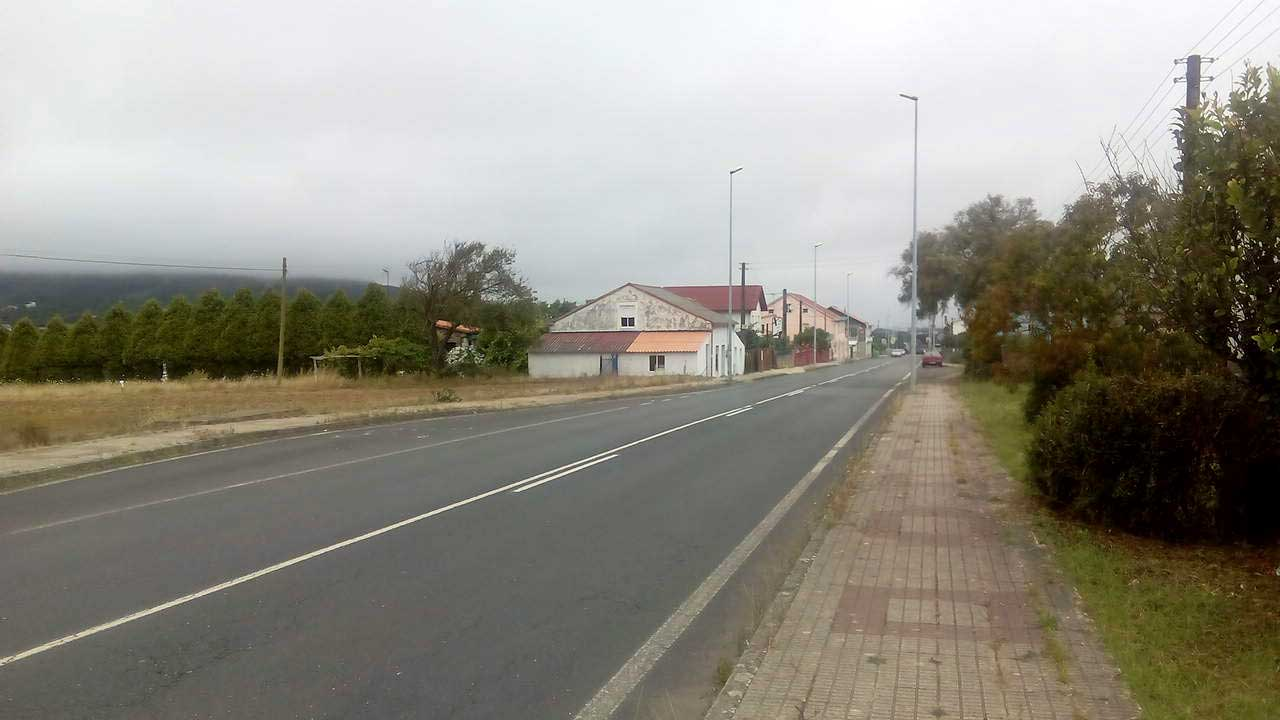 Vista dos Canteiros na AC116.